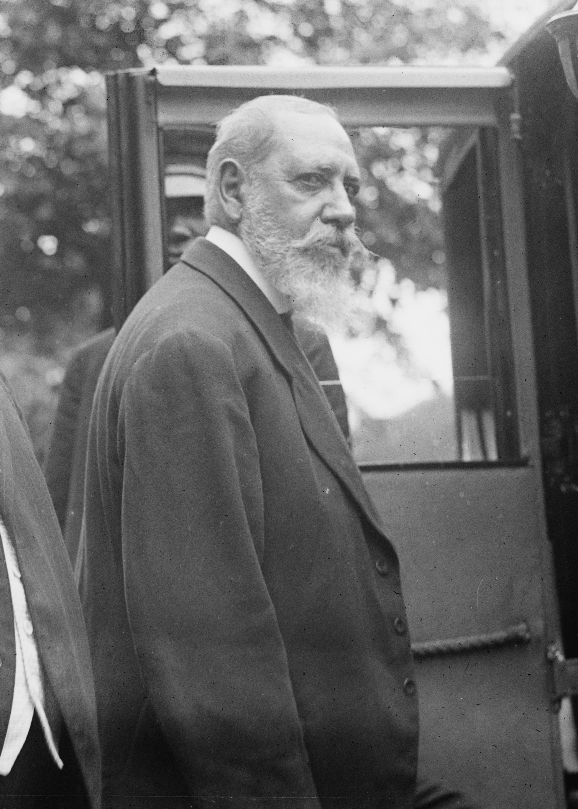 Depicted person: Fernando Iglesias Calderón